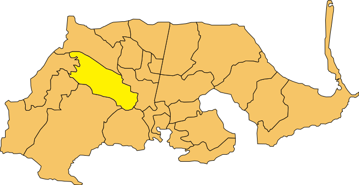 Ubicación de El Palmero en Cartagena